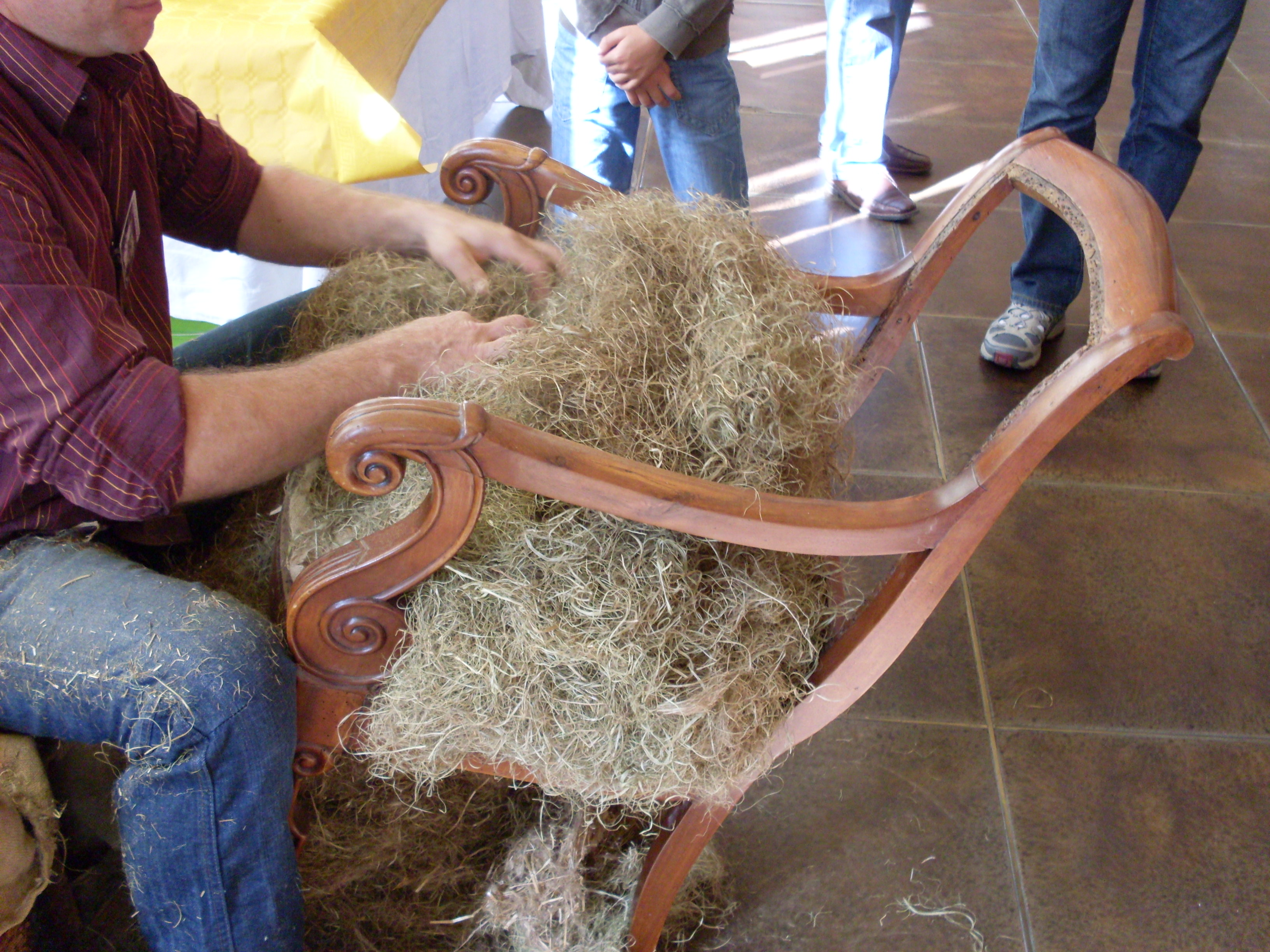 Tapissier en train de rembourrer une chaise avec du crin végétal